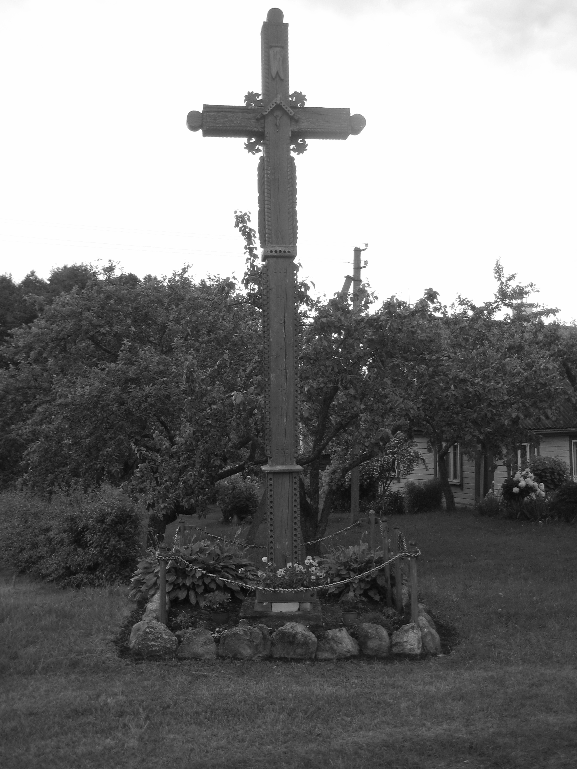 Šlepečiai 28412, Lithuania